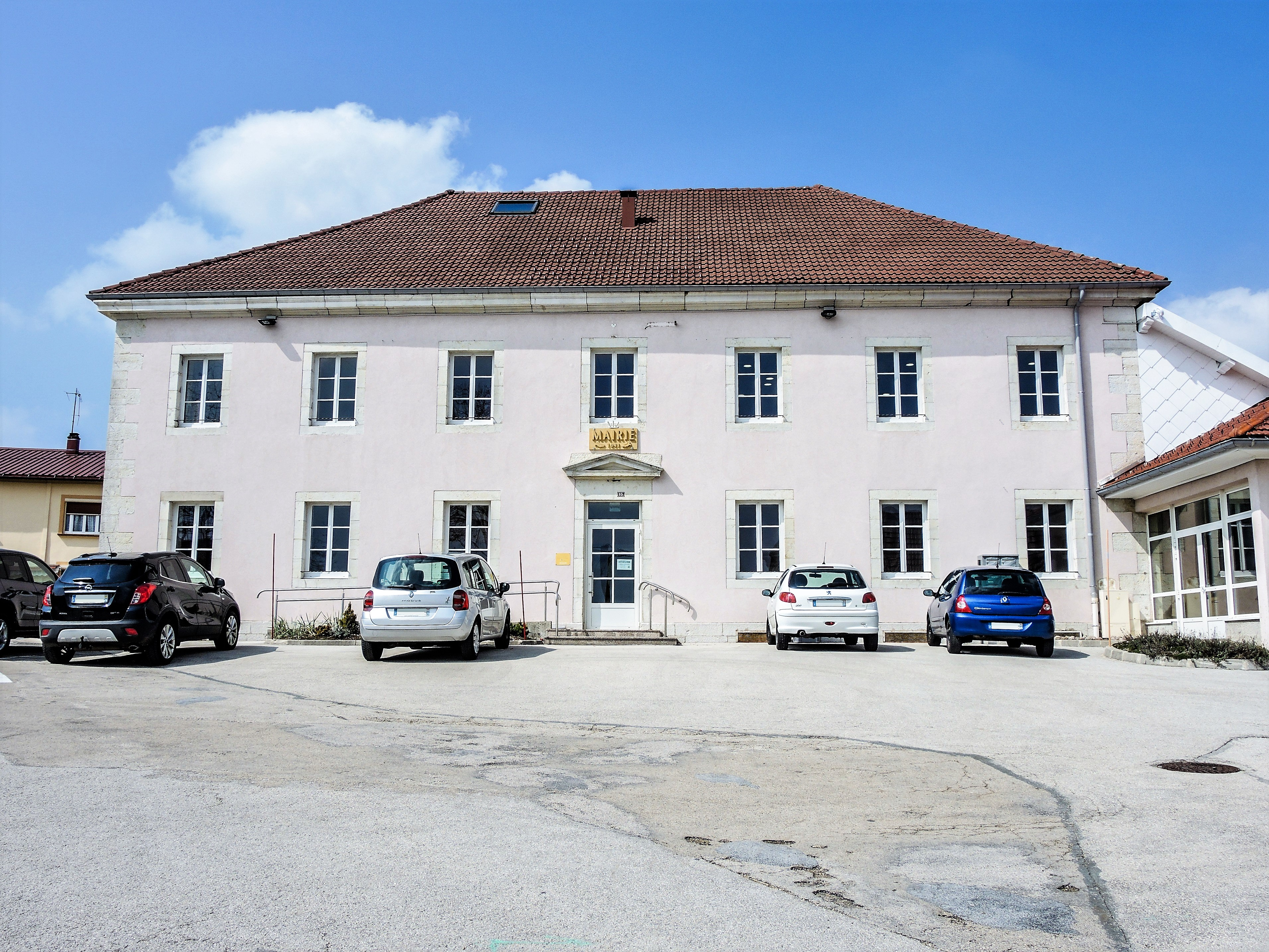 Mairie